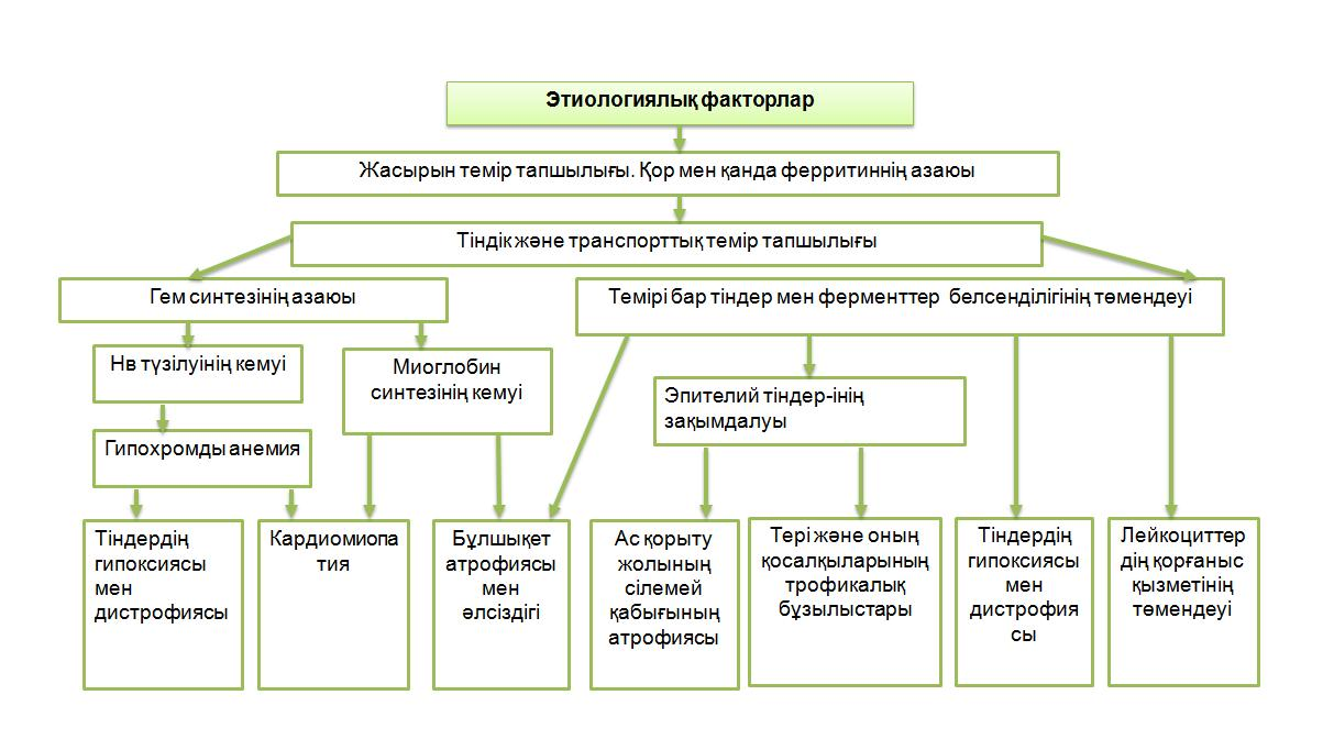 Темір тапшылық анемиясының патогенезі